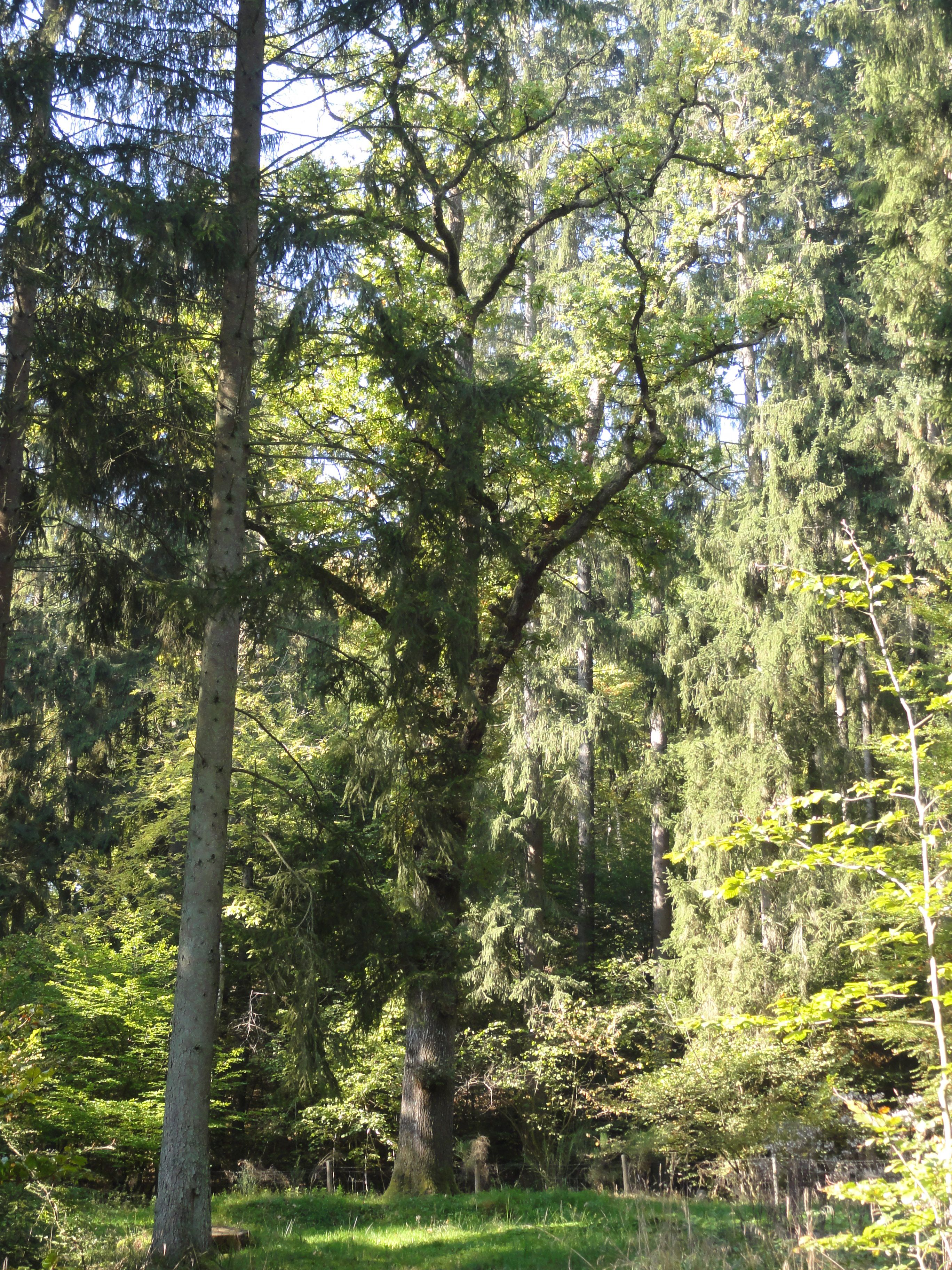 Ca. 200 Jahre alte Eiche im Waldstück Rossbach, Gemeinde Mauel, laut Legende war hier ein Lagerplatz der Truppen Napoleons